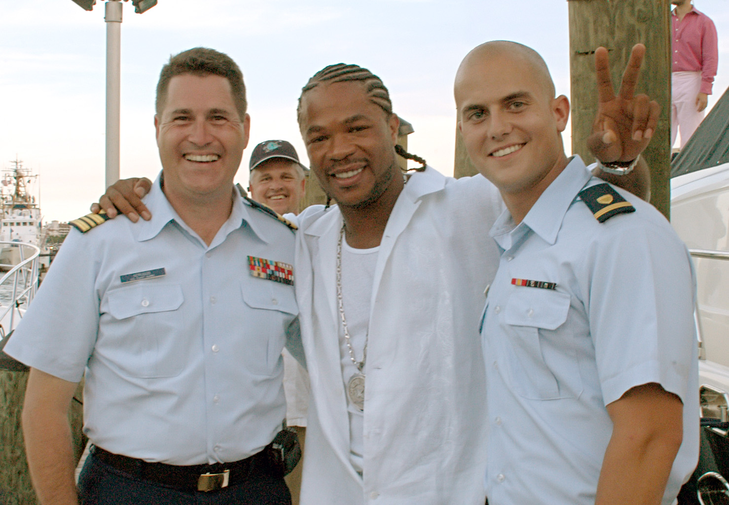 MIAMI (Aug. 29, 2004) -- MTV 2004 Video Music Awards performer Xzibit poses for a picture with Ens. Joseph Klinker and Lt. Cmdr. Lee Scruggs of Sector Miami next to his yacht. USCG photo by PA2 Anastasia Burns. Änderungen: entrauscht, fleck entfernt, an farben und helligkeit gedreht, leicht nachgeschärft. Uploaded with Reworkhelper